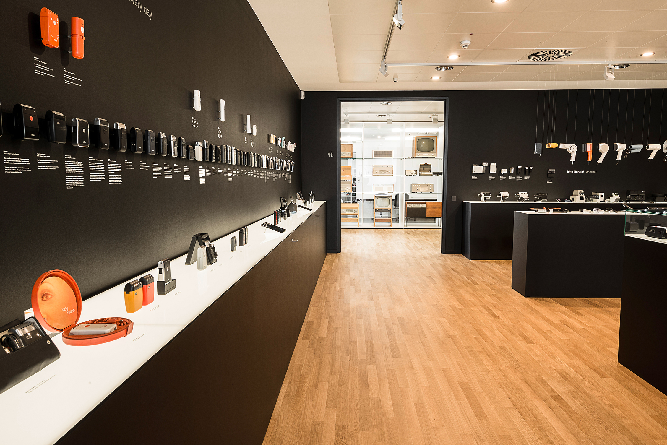 Blick in die Ausstellung der BraunSammlung, Kronberg